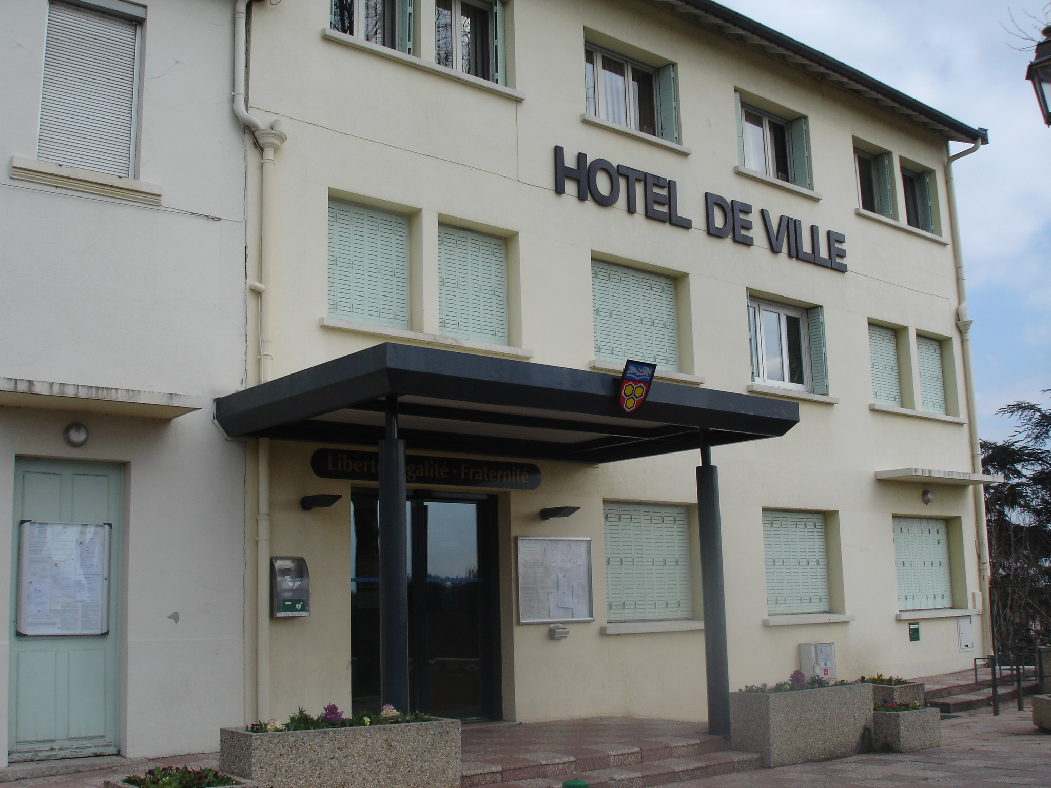 Corbas : Ancienne mairie (69)